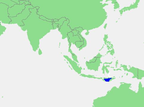 Savoe Sea